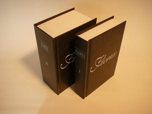 Florex II